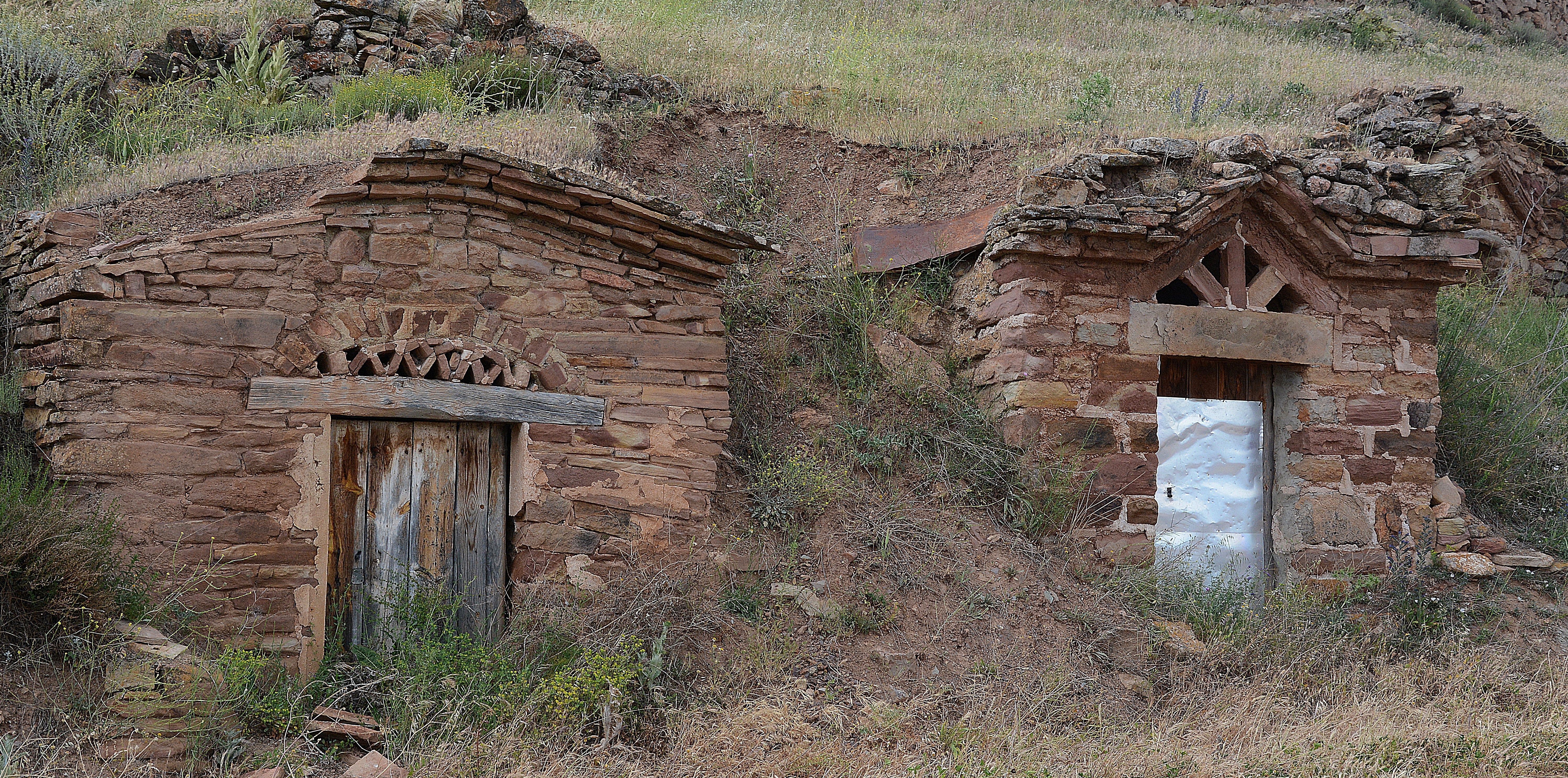 Las antiguas bodegas bajo tierra de Pomer, en Zaragoza (España), son unos de los edificios de mayor interés etnológico de la comarca. Almacenaban el vino que iba a ser consumido durante el año y lo conservaban a una temperatura constante.